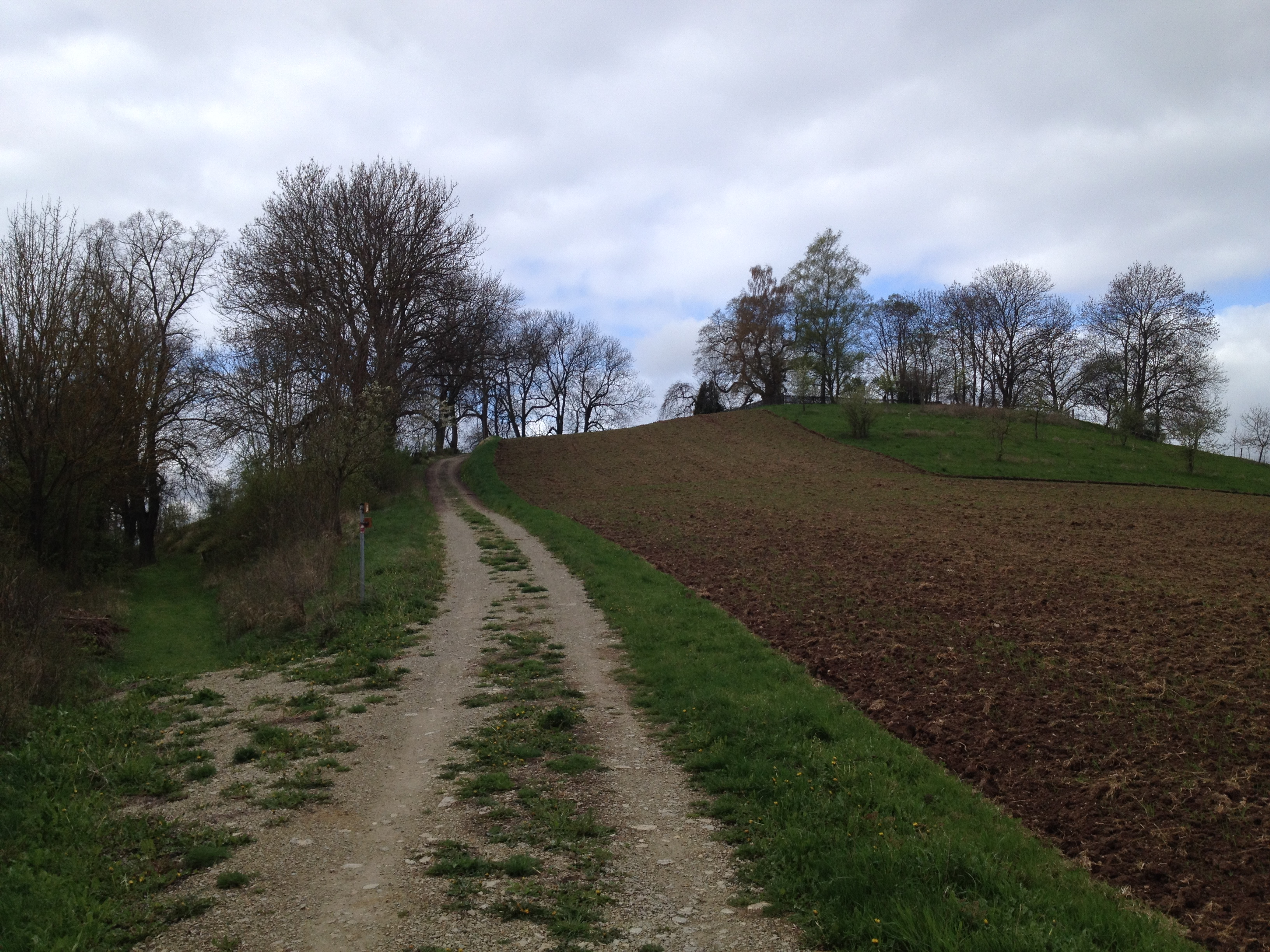 Der Eco Pfad Kulturgeschichte Wolfhagen zwischen den Stationen Wasserschloss Elmarshausen und Kirche St. Peter auf dem Schützeberg, mit Blick von Norden auf den Schützeberg